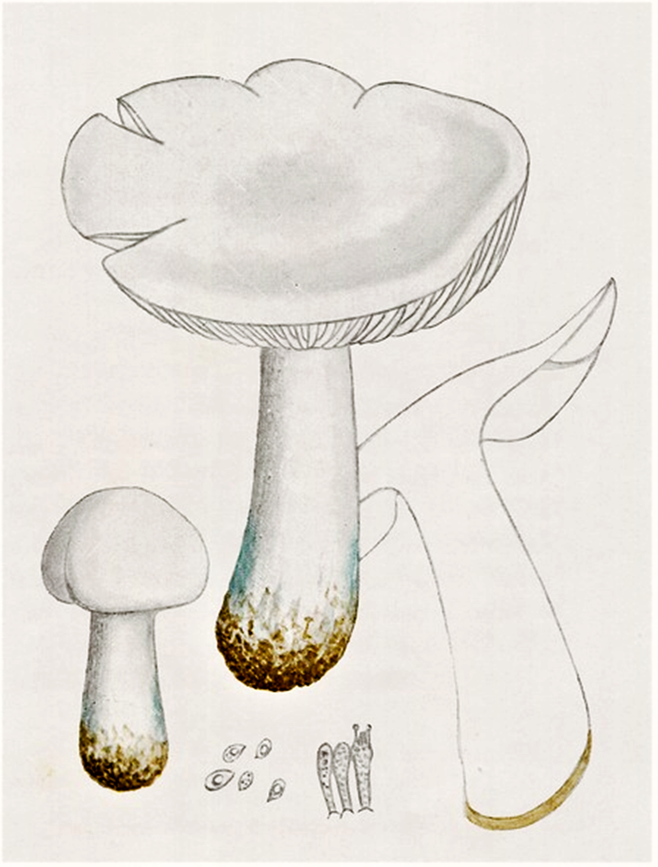 Giacomo Bresadola: Tricholoma columbetta (Fr., 1821) P.Kumm. (1871)